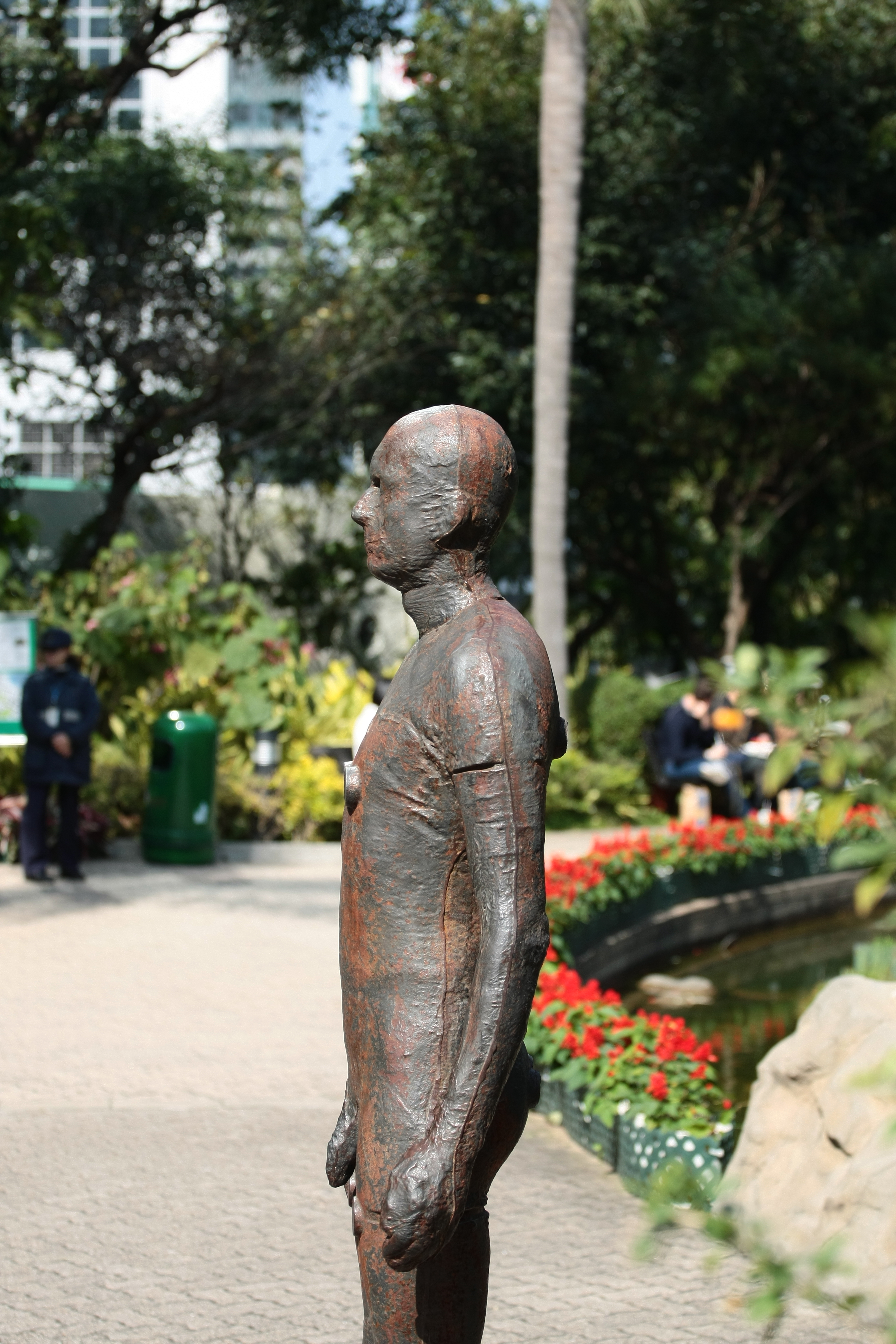 Инсталляции скульптур английского скульптора монументалиста Энтони Гормли на крышах зданий, тротуарах и парках в Центральном и Западном районах Гонконга. Все скульптуры повторяют тело самого скульптора и сделаны из железа и стекловолокна.